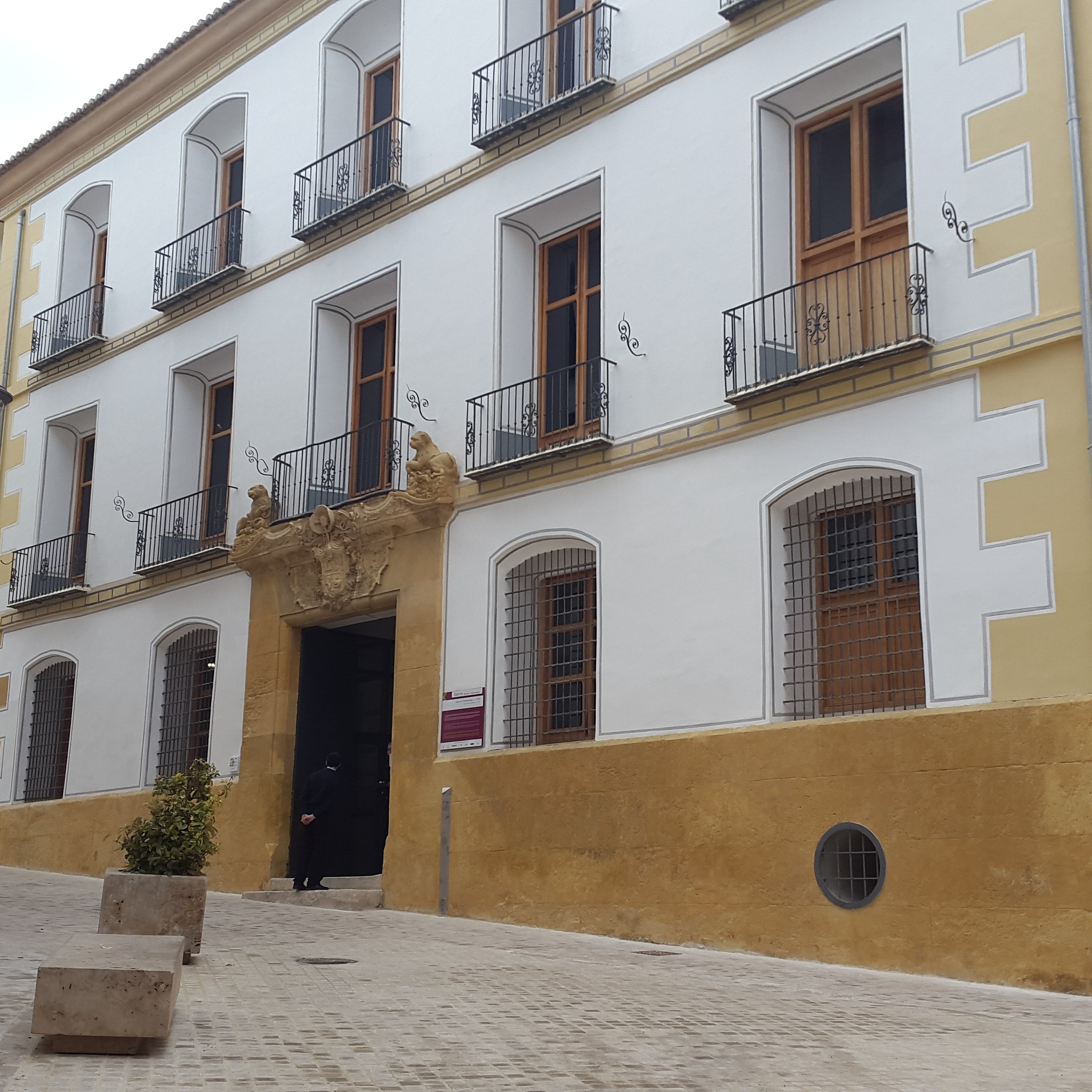 Part exterior de la Casa de la Ensenyança